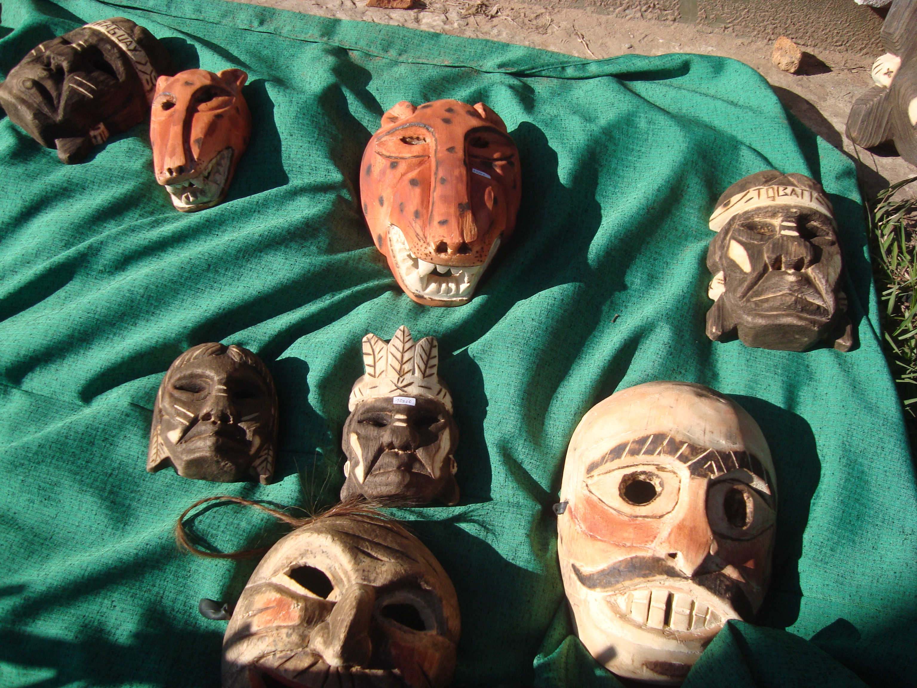 Máscaras tradicionales, hechas de raíz de timbó por Nestor Portillo, artesano de la ciudad de Tobatí (Paraguay)